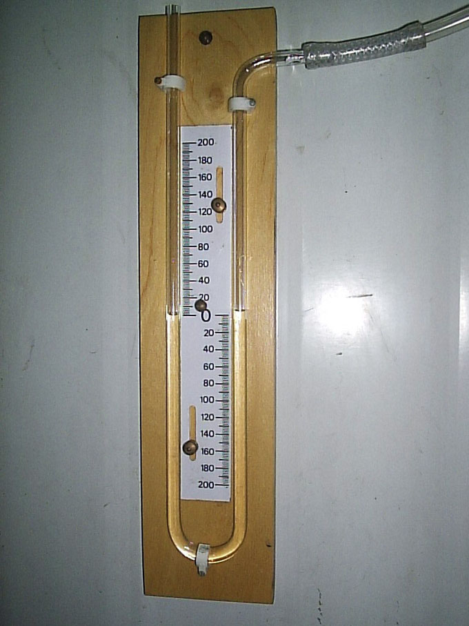 Manómetro diferencial de inspección en puerta de camára frigorífica de atmósfera controlada. Este registra la diferencia de presiones estáticas interior y exterior de la cámara en milímetros de columna de agua.